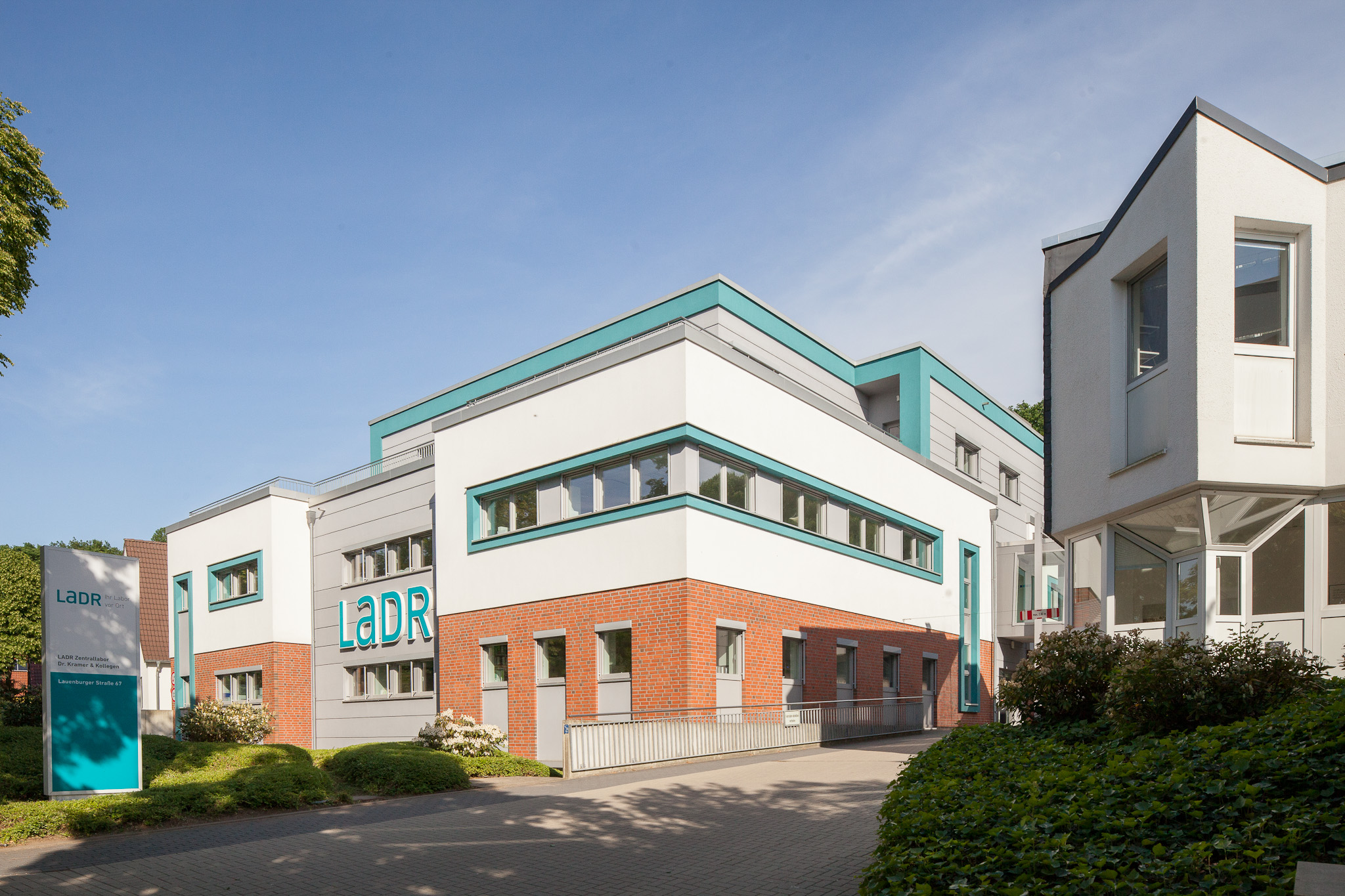 Das LADR Zentrallabor Dr. Kramer & Kollegen in der Lauenburger Straße in Geesthacht. Über die Labormedizin hinaus gibt es hier zur Probennahme eine Blutentnahmestelle sowie das Impfzentrum.